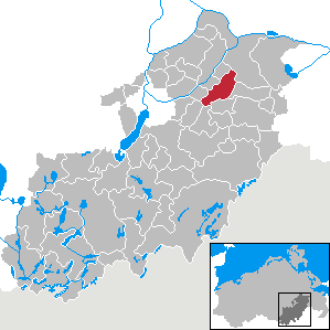 Eichhorst in Mecklenburg-Vorpommern, Landkreis Mecklenburg-Strelitz